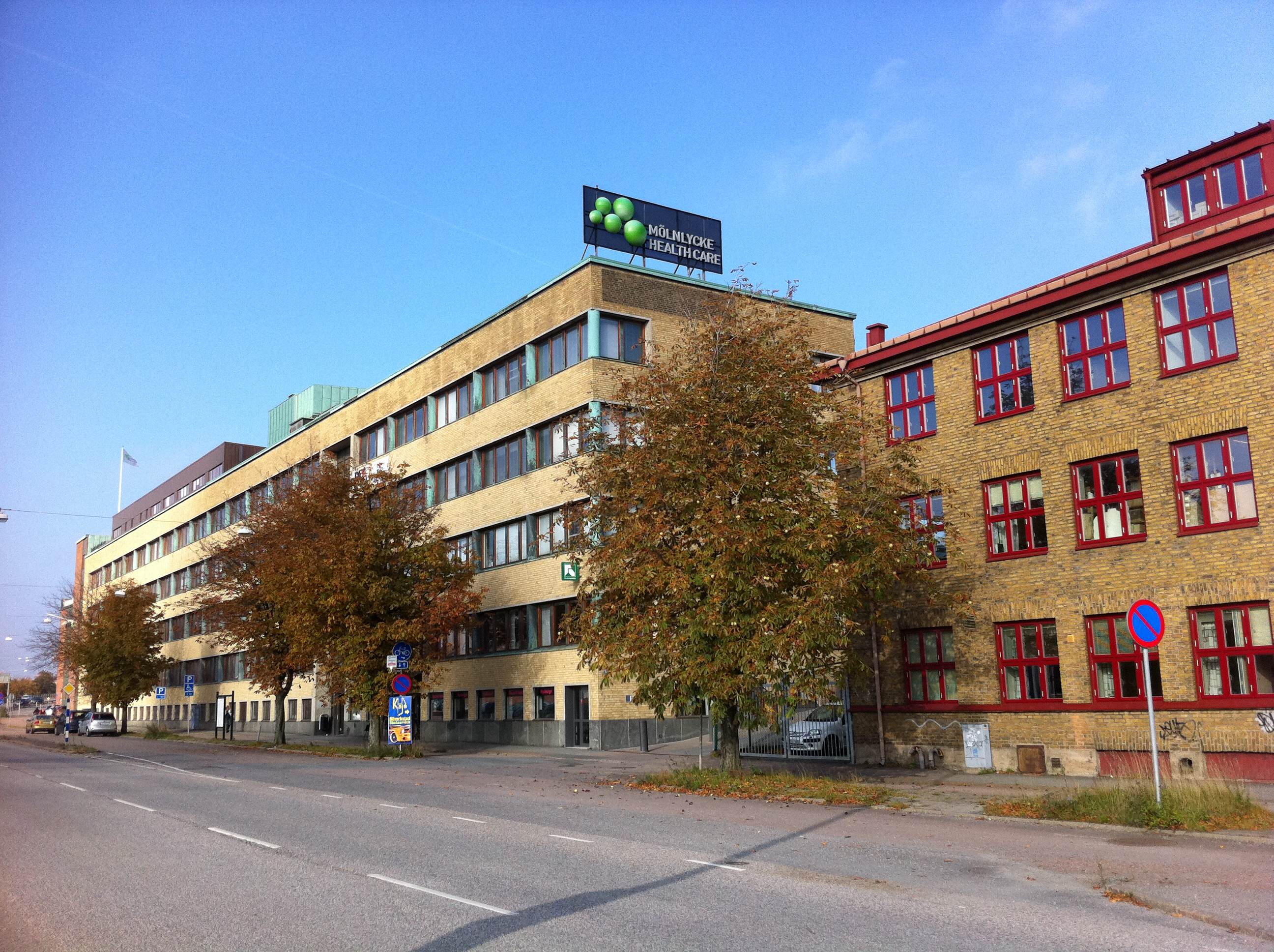 Turitzhuset (fastighetsbeteckning Bagaregården 17:26) vid Gamlestadsvägen 3C i Göteborg.